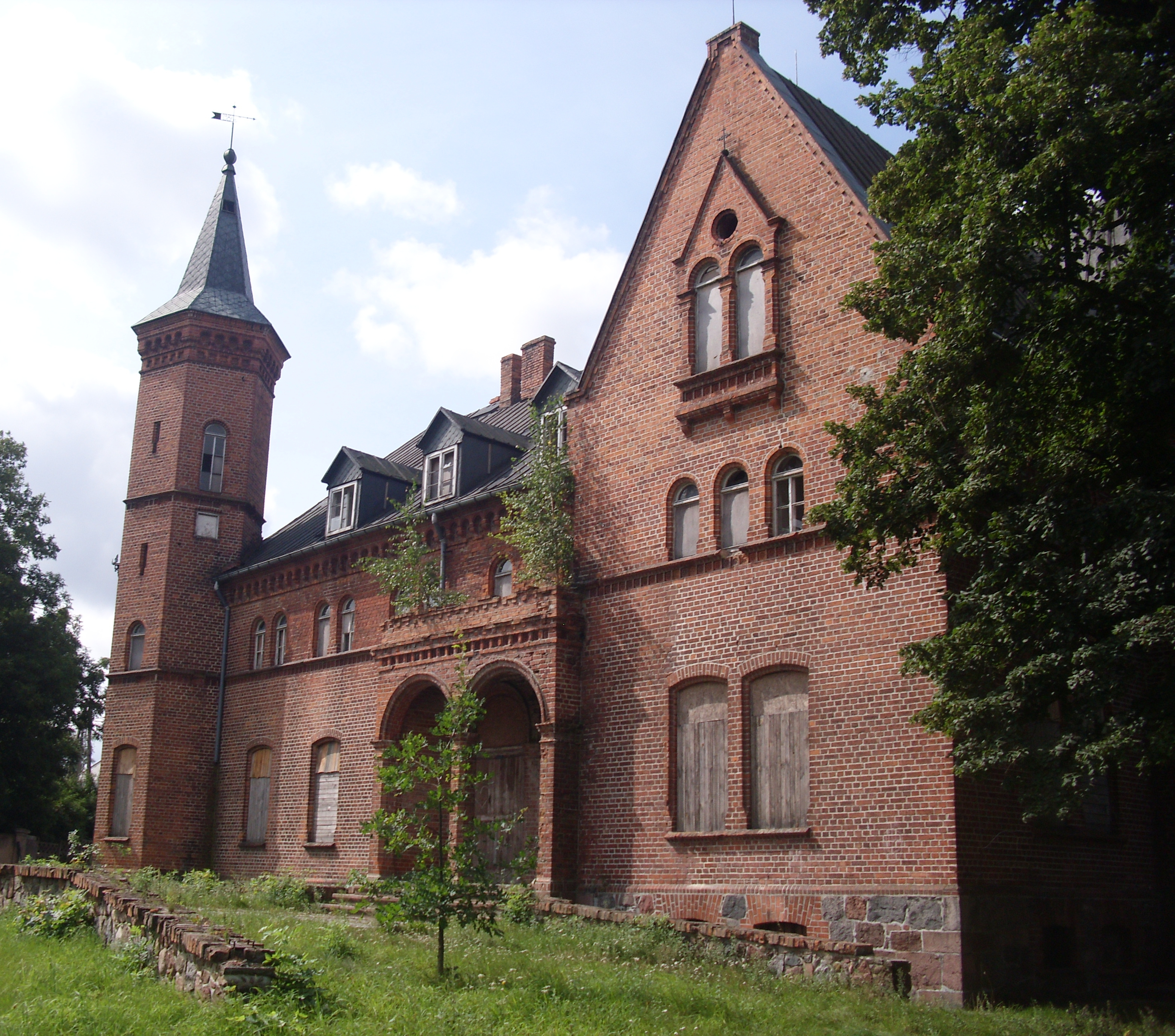 Radzim - zespół dworski, 1867: dwór